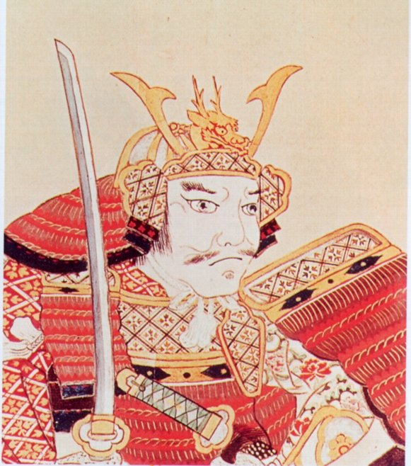 南部信直。Nanbu Nobunao 戦国時代から安土桃山時代にかけての大名。